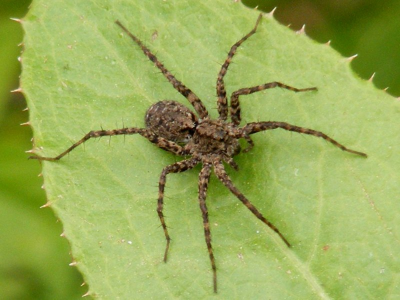 Pardosa milvina : Photographié dans la région montréalaise les 20 et 22 juin 2011, sur Fujifilm FinePix S700.